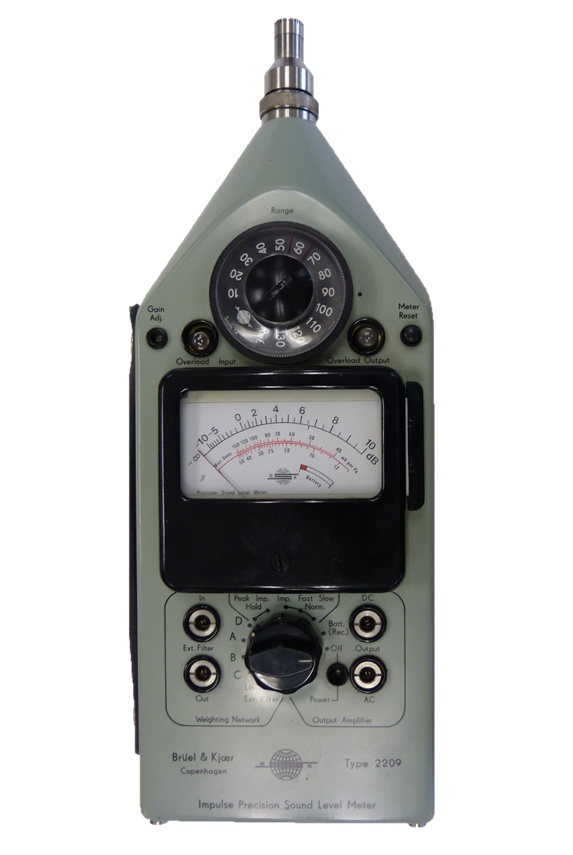 historisches Schallpegelmessgerät